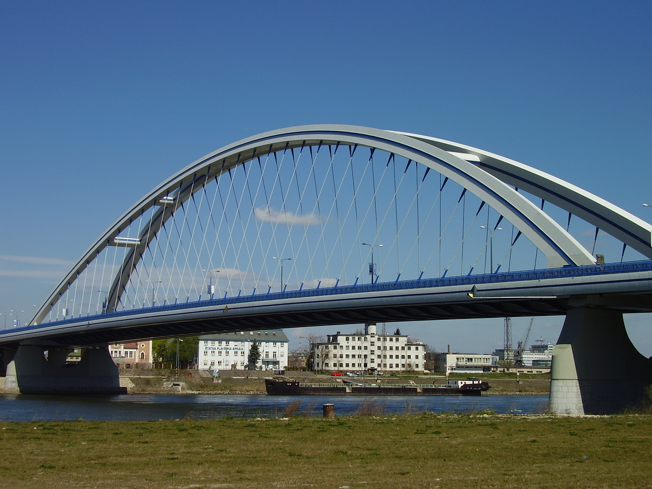 Bratislava